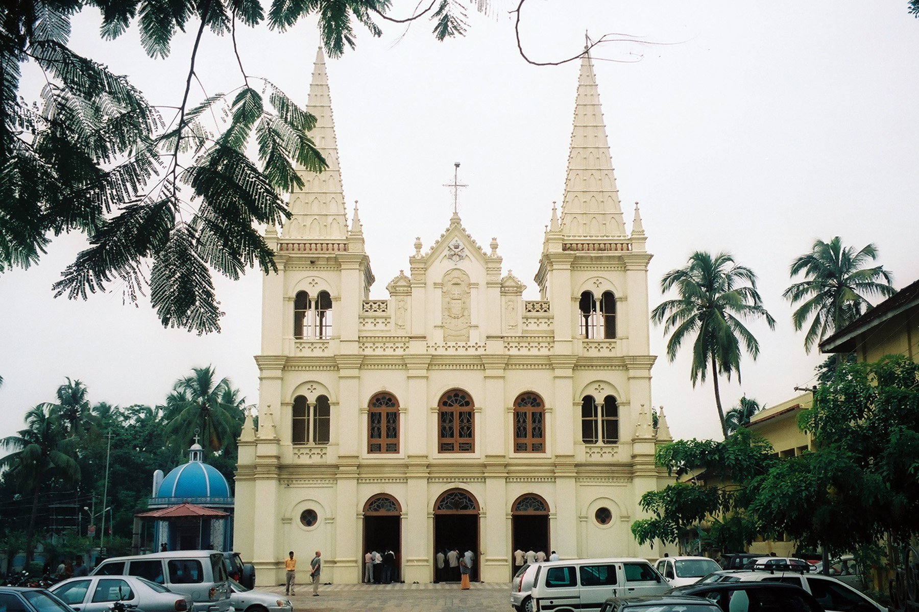 Cattedrale di Fort Cochin